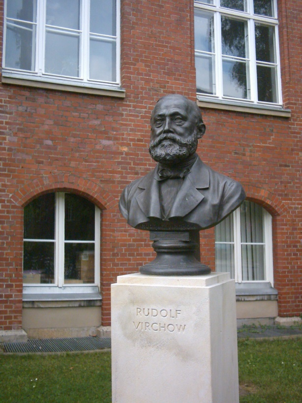 Rudolf Virchow, Bronzebüste vor dem Pathologischen Institut der Charite, Berlin. Kopie einer Marmorbüste des Bildhauers B. Afinger aus dem Jahre 1882